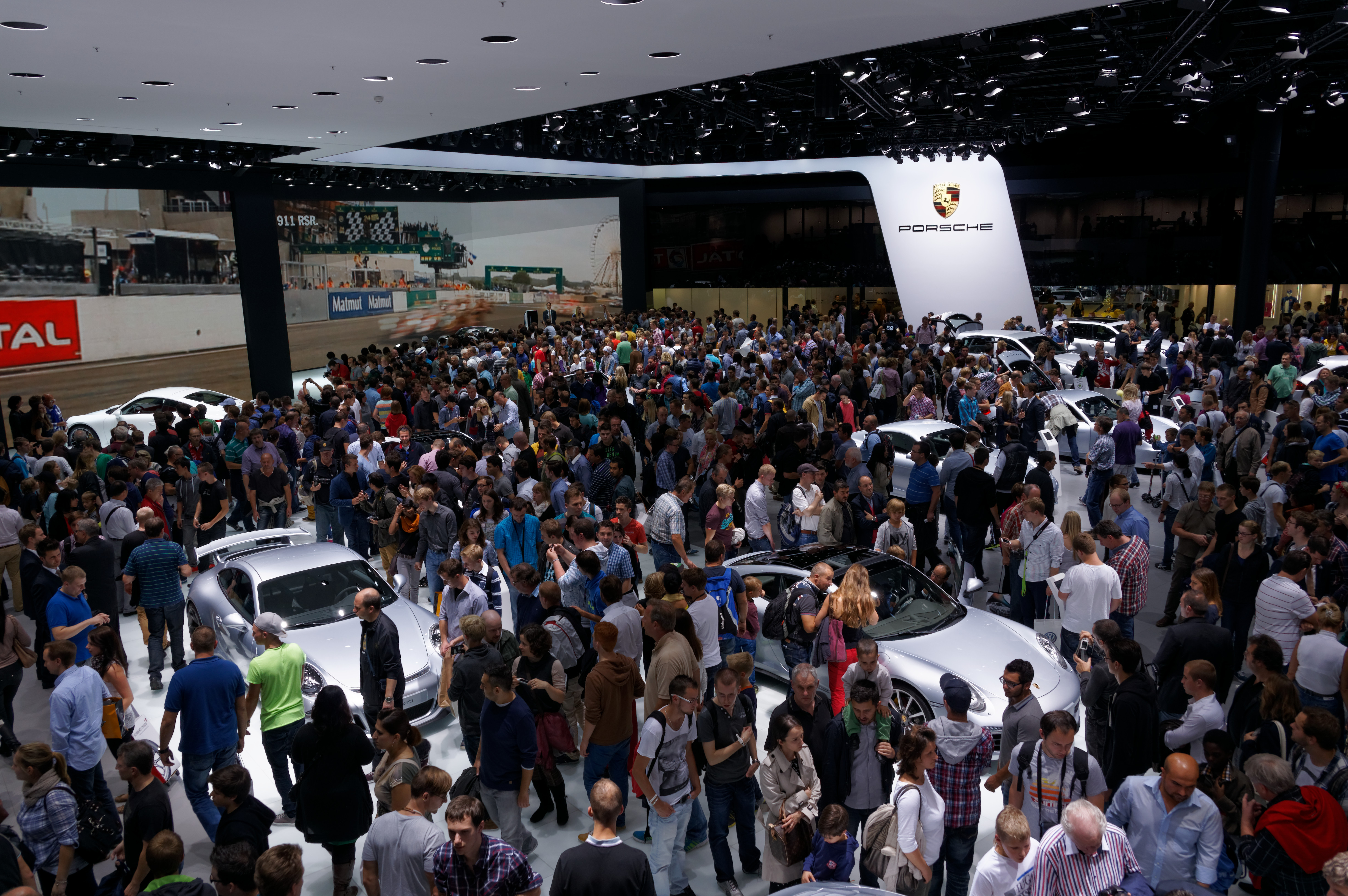 DSC01972_DxO